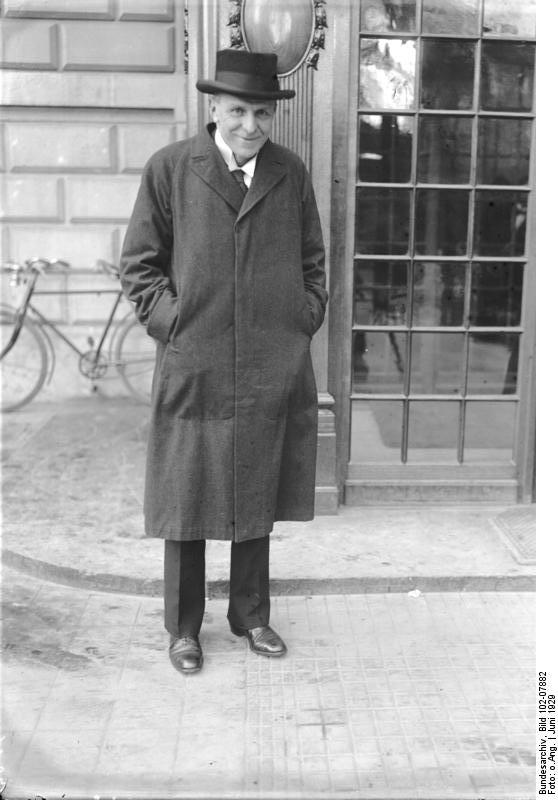 Der englische Lord Robert Cecil in Berlin! Der englische Lord Robert Cecil, welcher im Reichstag in Berlin einen Vortrag über die Abrüstungsfrage hielt.